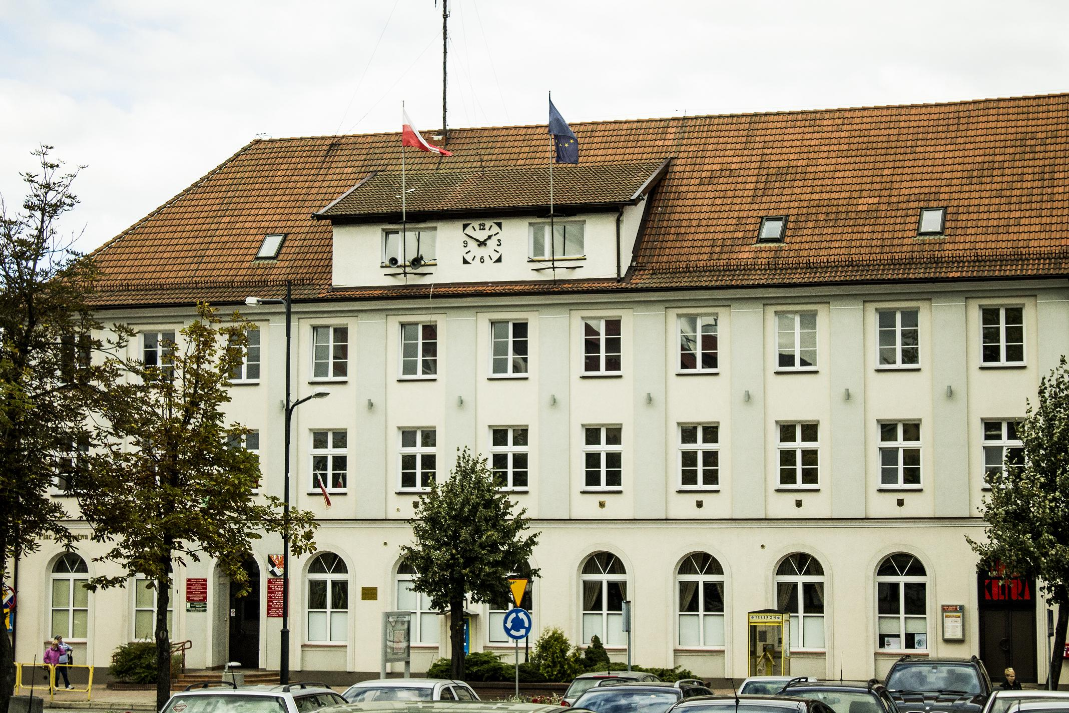 Gołdap, plac Zwycięstwa 14 - dawny hotel, obecnie dom (po 1920) 03.1994.